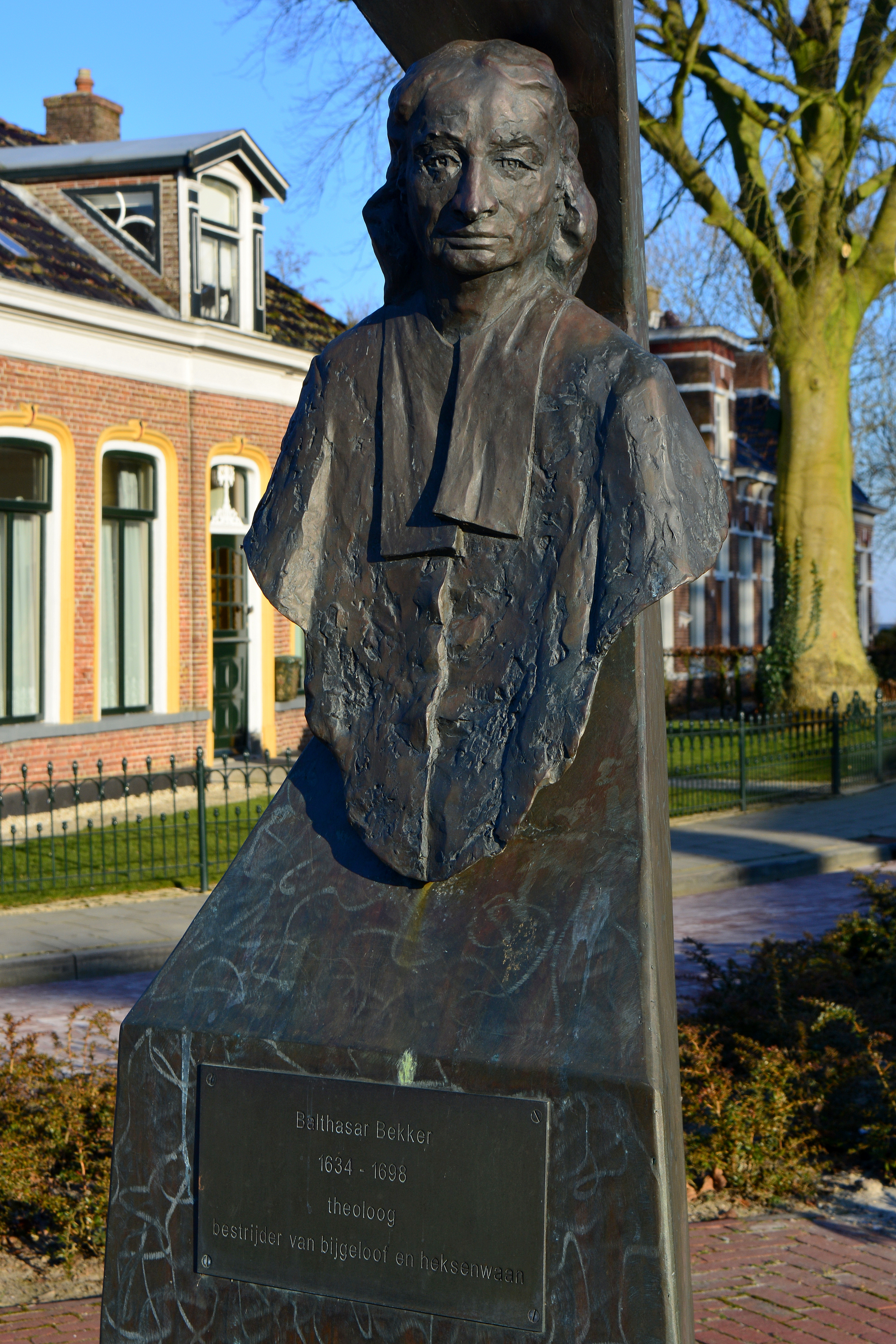 Byld Balthasar Bekker, Balthasar Bekkerstrjitte, Mitselwier